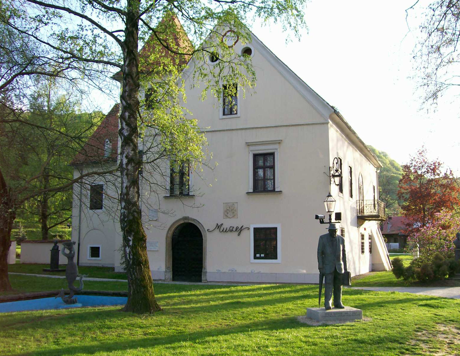 Samoborski muzej